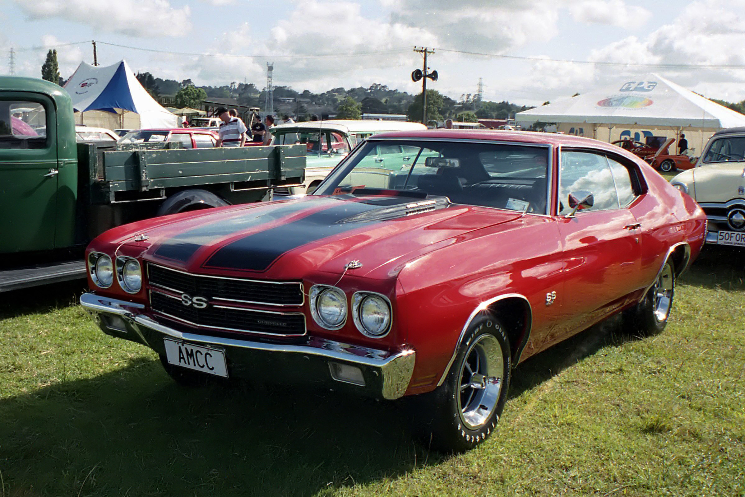 1970 Chevrolet Chevelle SS